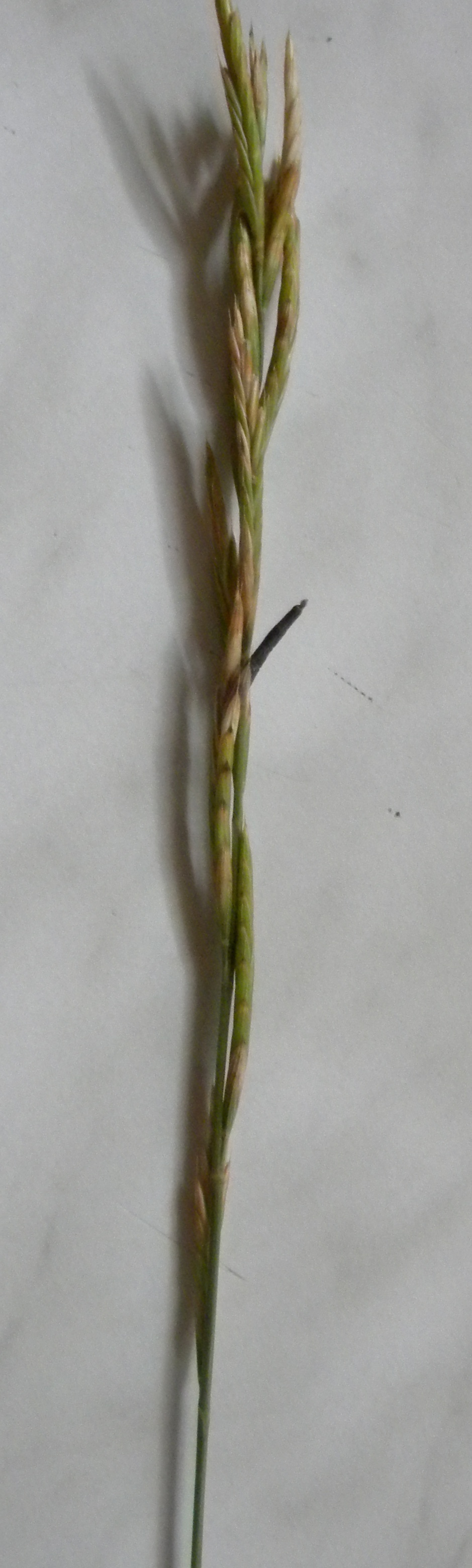 Brachypodium pinnatum avec Claviceps purpurea